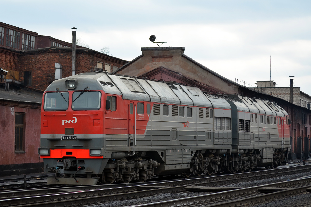 С завода поступил в депо Иваново